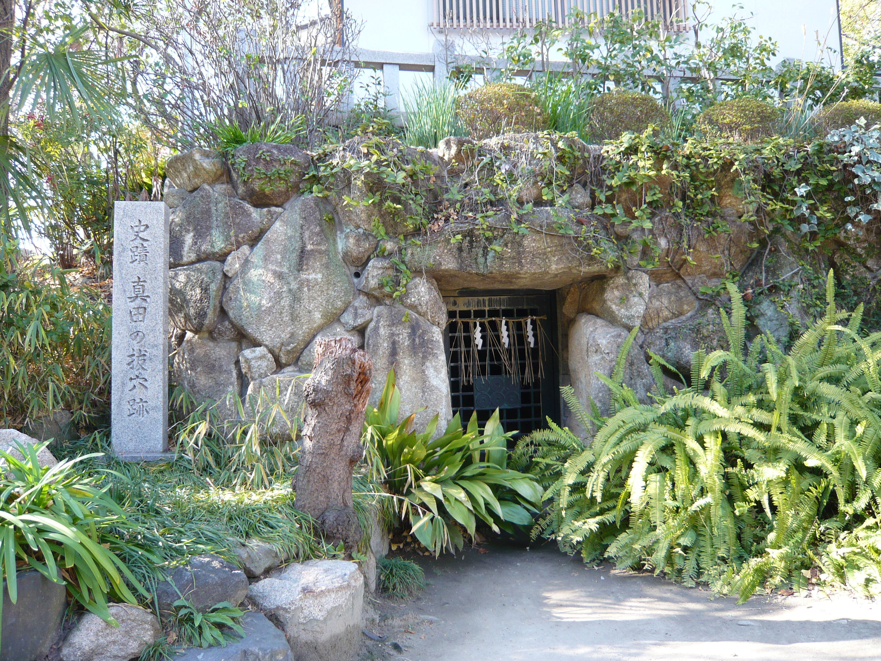 the tunnel to Ōsaka castle in Sankō-jinja, Tennōji, Ōsaka, Ōsaka, Japan 三光神社（大阪市天王寺区）内 真田の抜け穴跡